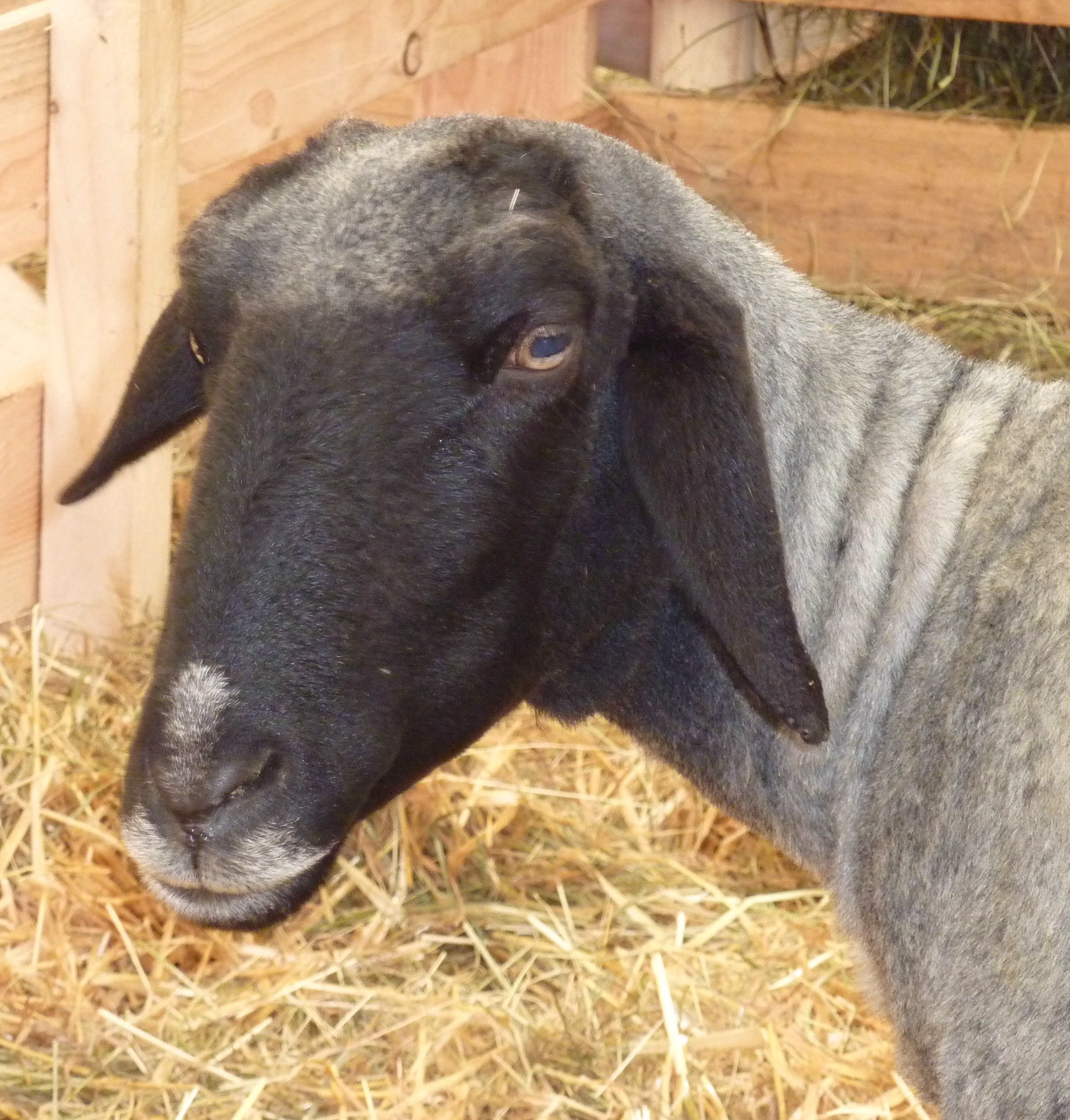 Landwirtschaftliches Hauptfest 2010